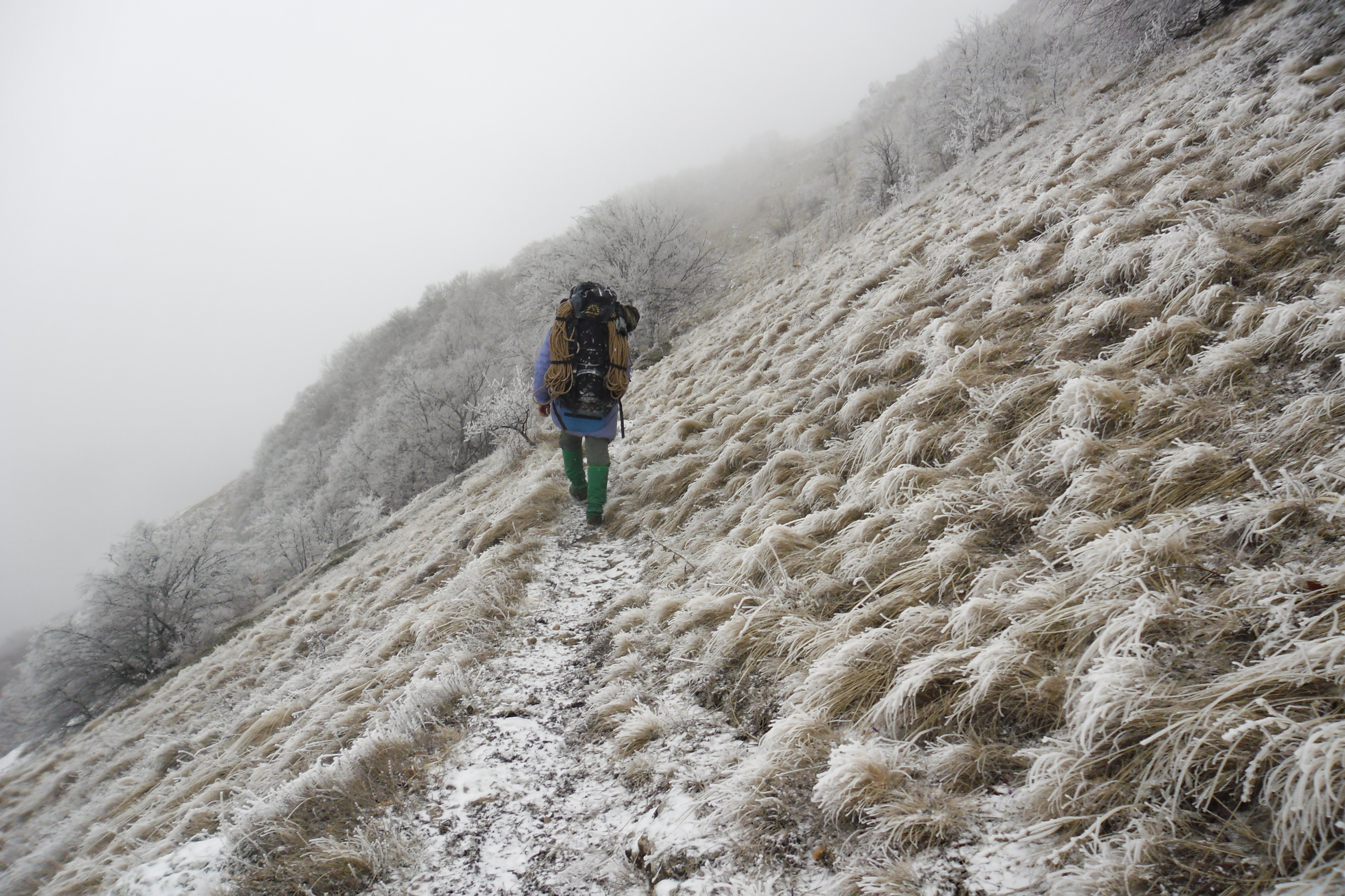 Фото